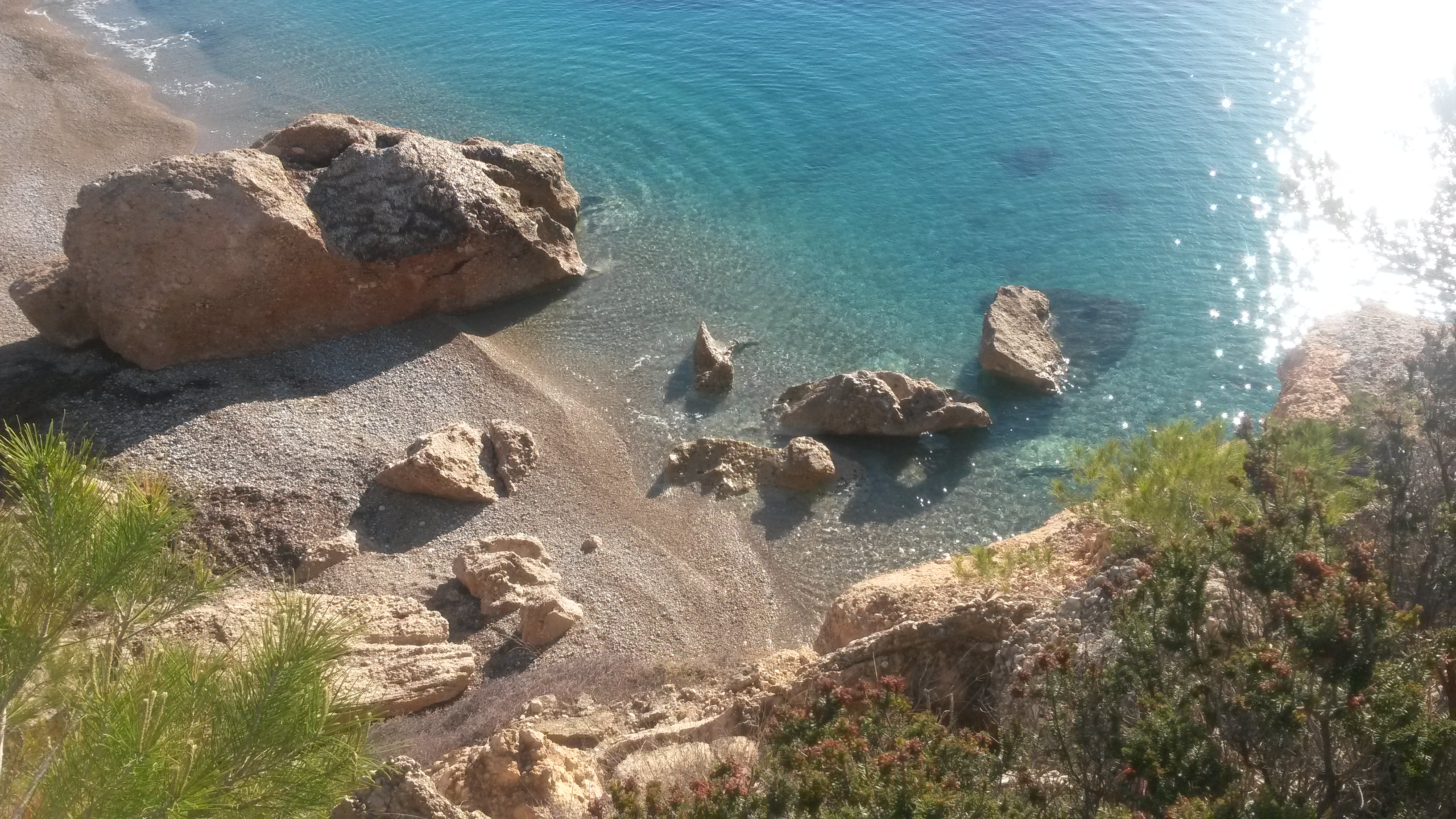 Foto de una de las 30 calas de l'Ametlla de Mar, Cala Xelín.